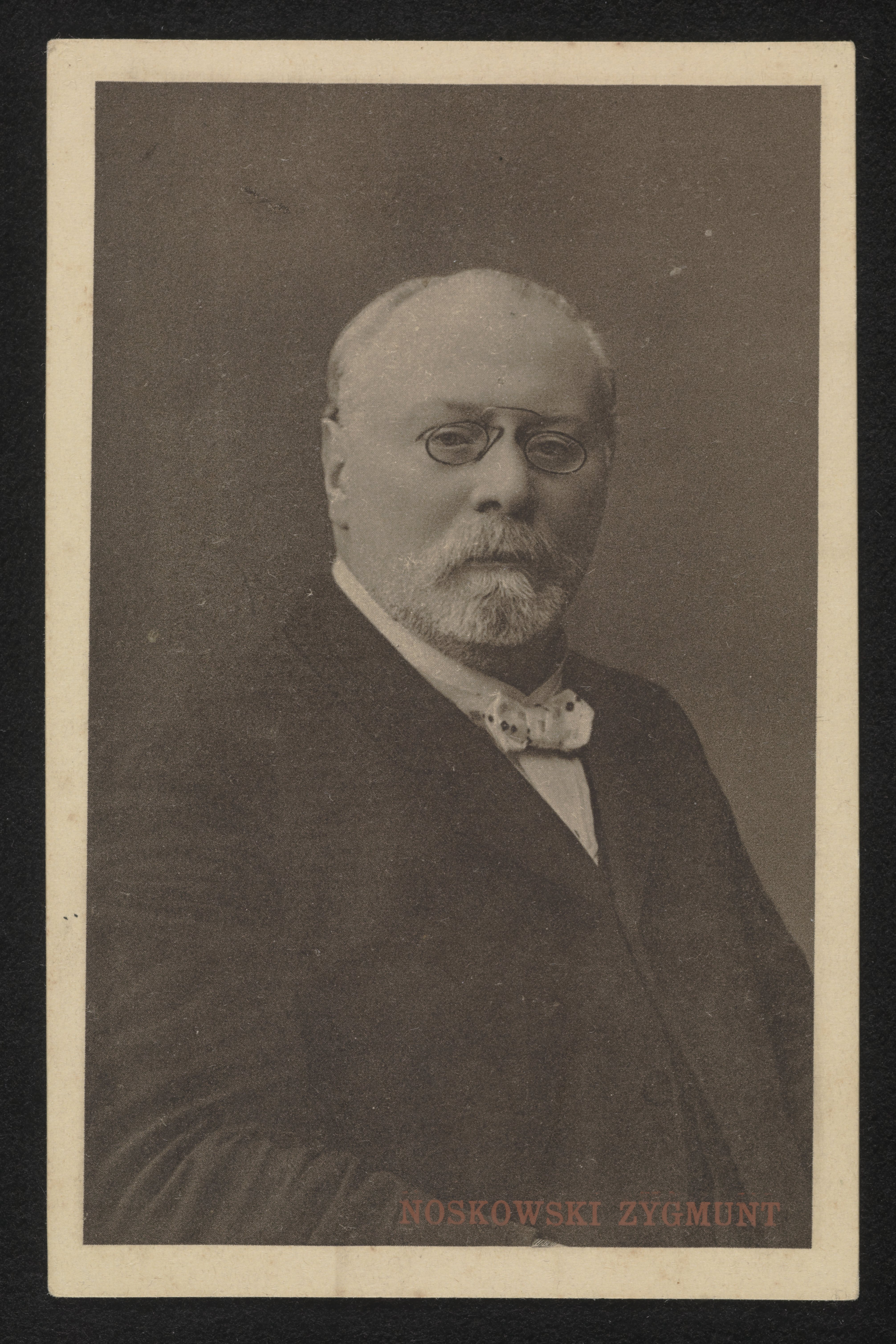 Zygmunt Noskowski, pocztówka wyd. w latach 1912-1918.